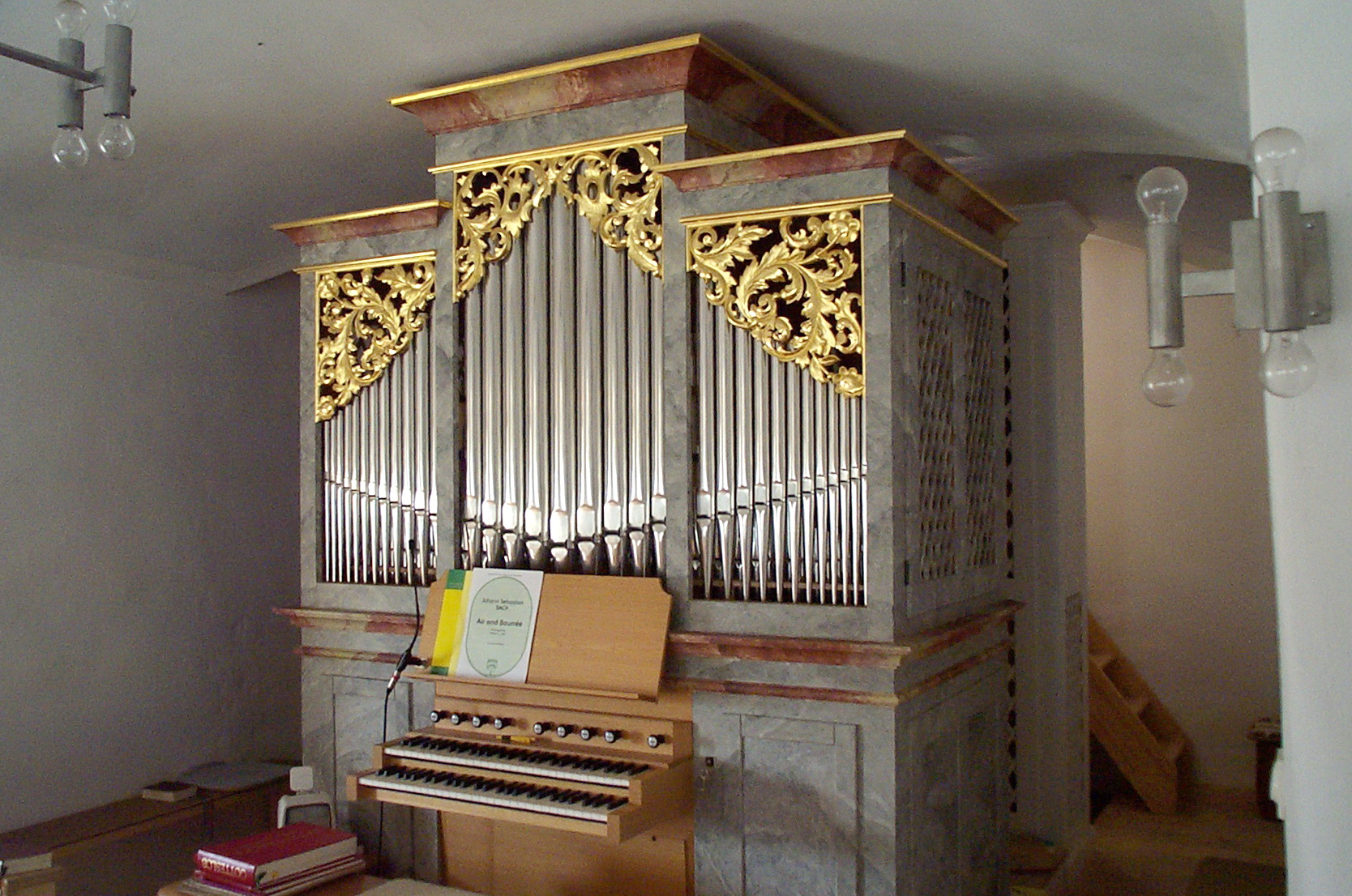 Herrngiersdorf, Semerskirchen, Am See 1. Katholische Pfarrkirche Mariä Himmelfahrt. Orgel mit dreiteiligem Prospekt und Schleierbrettern mit Akanthusranken. Sie steht auf der Westempore, die mit dem 1. Obergeschoss des Turmes verbunden ist.